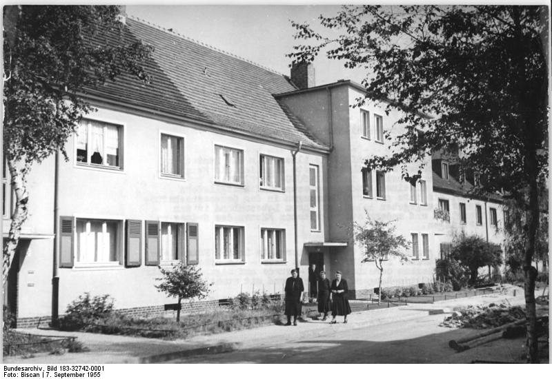 Zentralbild-Biscan 7.9.1955 Das erste genossenschaftliche Altersheim in der DDR eröffnet Das erste genossenschaftliche Altersheim der Deutschen Demokratischen Republik eröffnete kürzlich die Heimstätten-Baugenossenschaft in Magdeburg-Westernplan. Es bietet 40 alleinstehenden Genossenschaftsmitgliedern Platz, die ihre größeren Wohnungen in den Genossenschaftshäusern aufgegeben haben, um ihren Lebensabend in den behaglich und modern ausgestatteten Räumen des Heims zu verbringen. UBz: Das genossenschaftliche Altersheim in der Friedrich-Naumann-Strasse in Magdeburg. Das Haus - ein durch amerikanische Bomben zerstörter Bau - wurde aus eigenen Mitteln der Heimstätten-Baugenossenschaft und mit staatlichen Krediten hergerichtet.